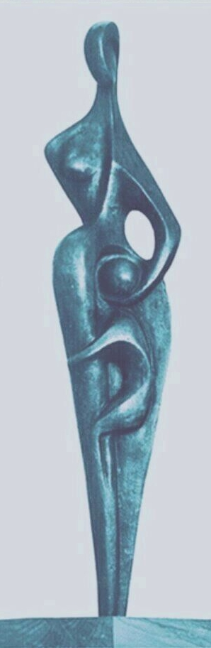 אם וילד, פסל של זהרה רובין